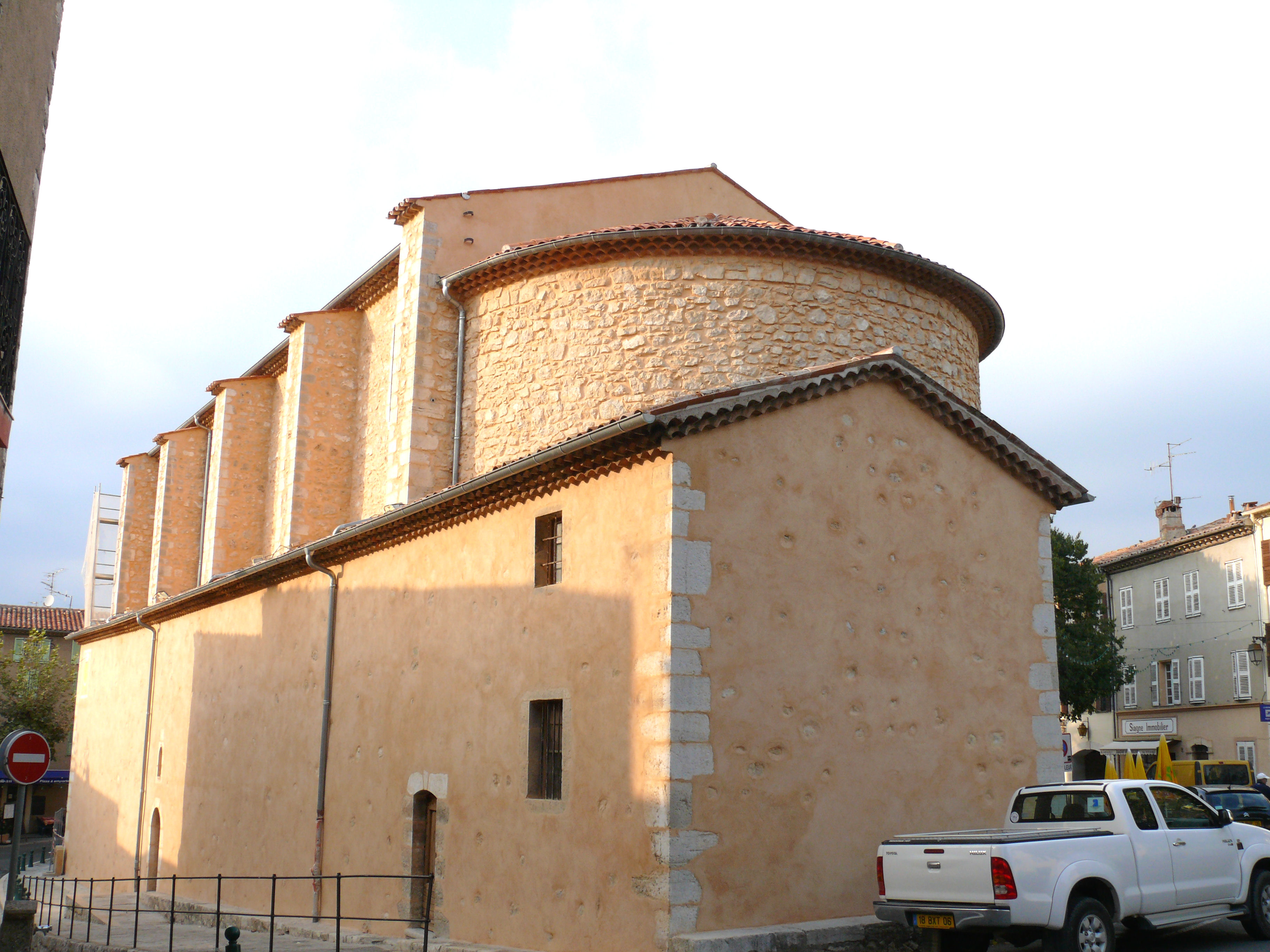 Saint-Cézaire-sur-Siagne (Alpes-Maritimes) - Église Saint-Cézaire